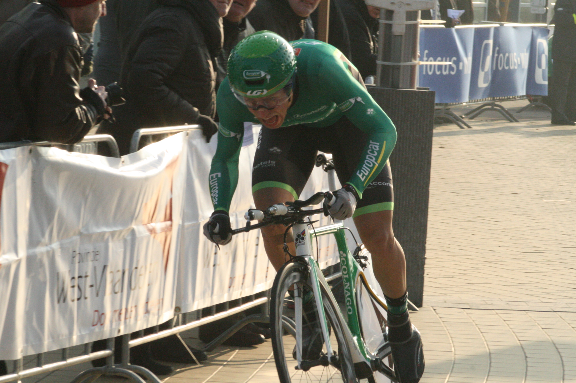 Driedaagse van West-Vlaanderen 2011, proloog in Middelkerke